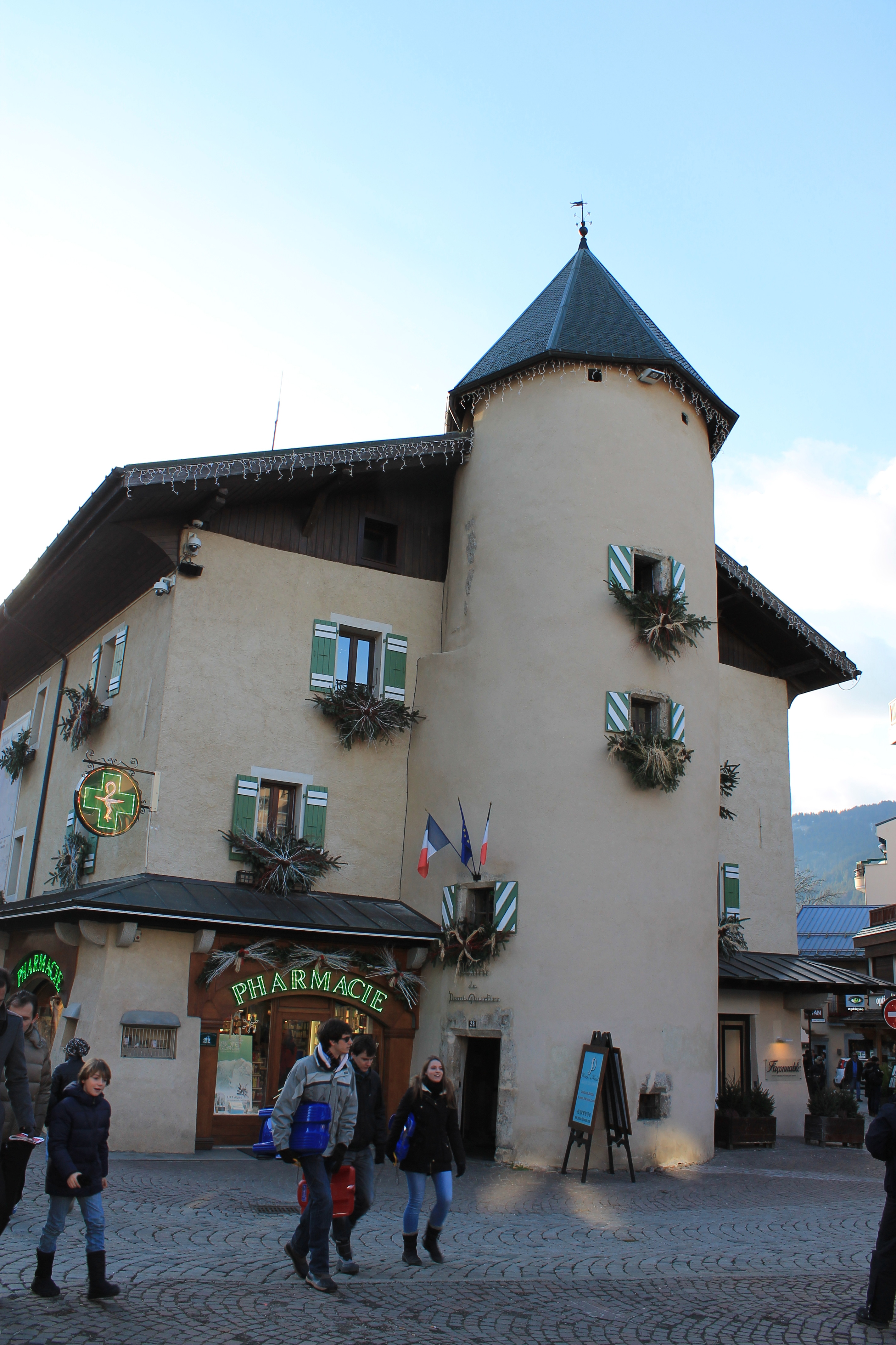 Donjon dit « La Tour de Demi-Quartier », ancienne maison de la famille de Capré, situé sur la commune de Megève, et mairie de Demi-Quartier.